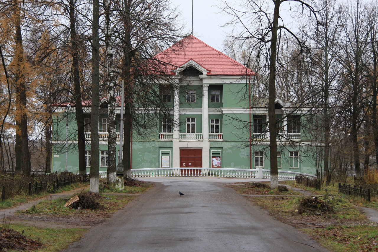 Архитектура в поселке ГЭС